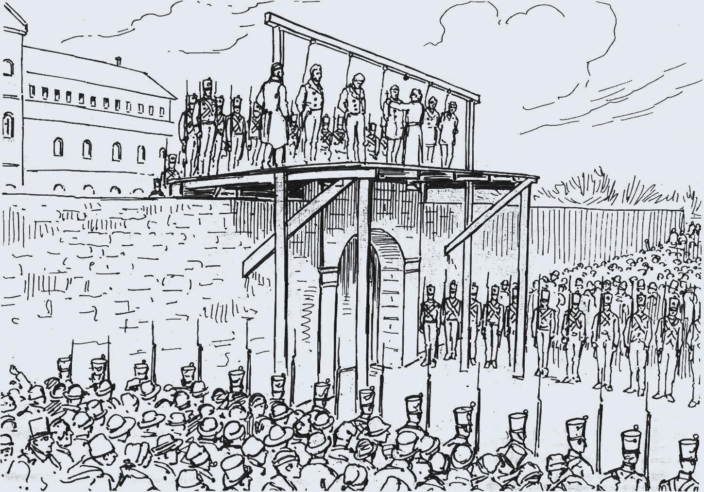 Pendaison de cinq patriotes sur l'échafaud installé au-dessus du portail de l'ancienne prison des Patriotes à Montréal au Québec.